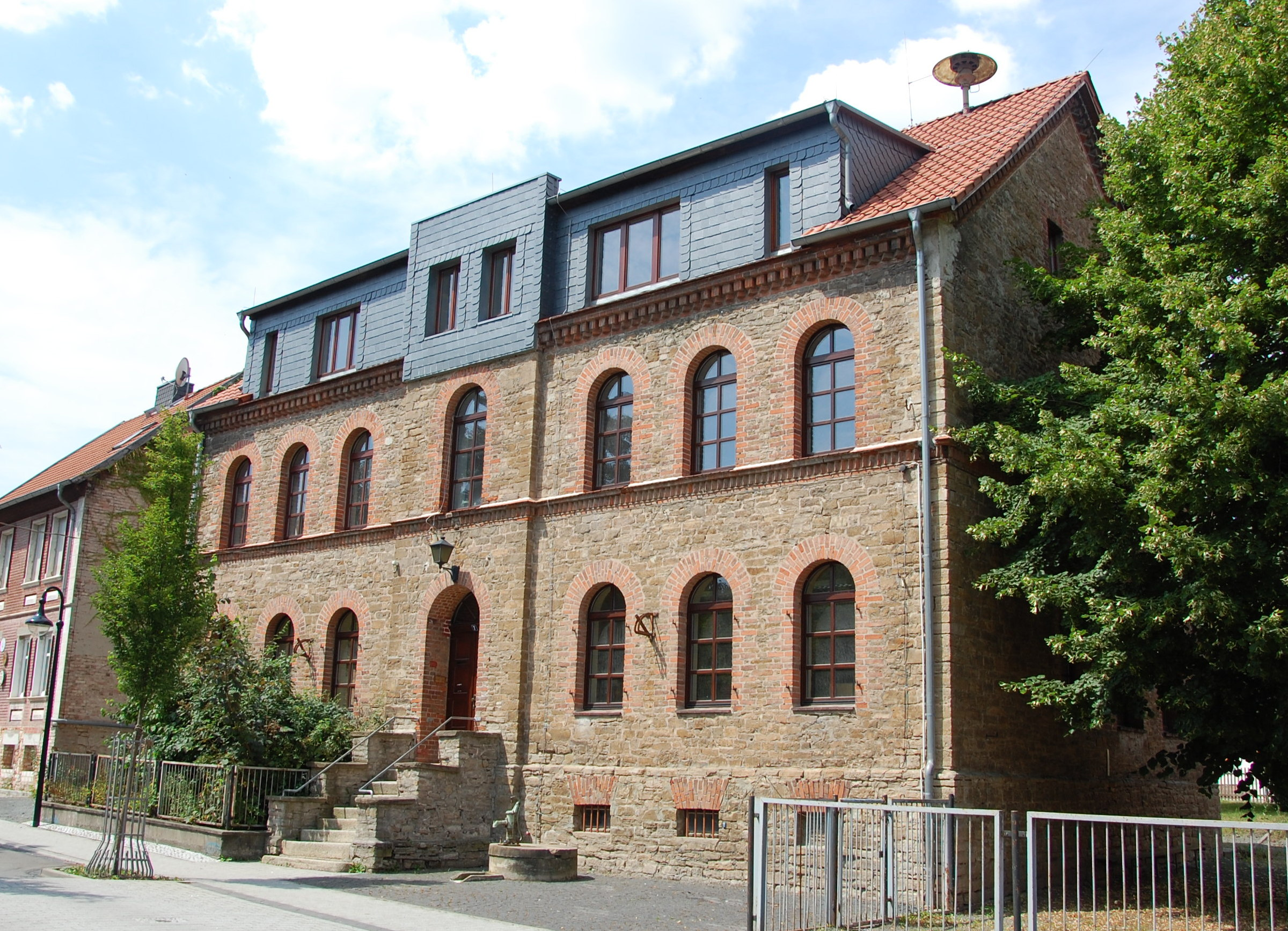 Haus Schulstraße 7 in Bad Suderode